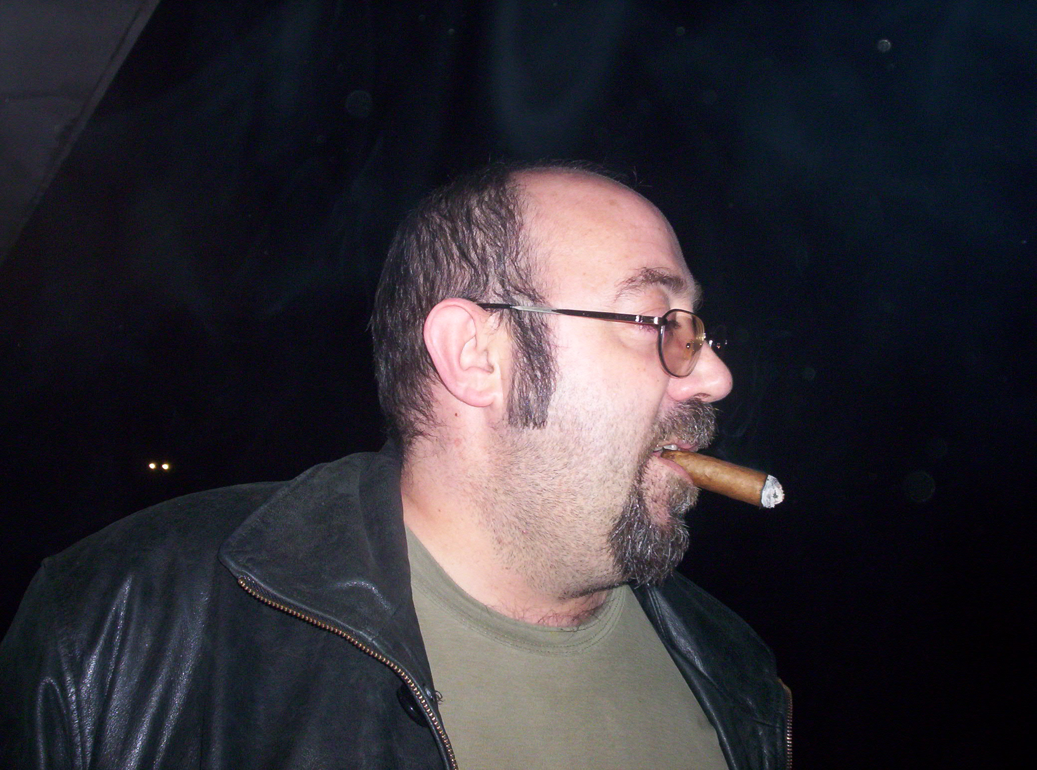 Богољуб Митић Ђоша Слика:Korisnik-vl_je_vlasnik-ap.png